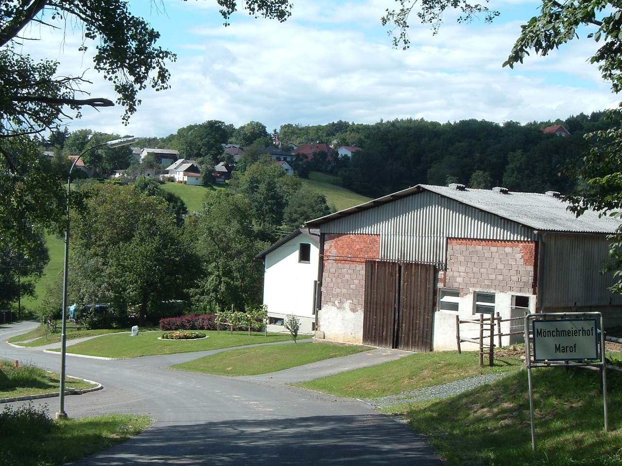 Mönchmeierhof, Burgenland, Austria